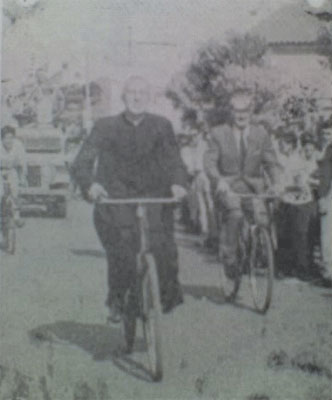 Monseñor Juan Presas, presbítero de la Basílica de Morón, Argentina.